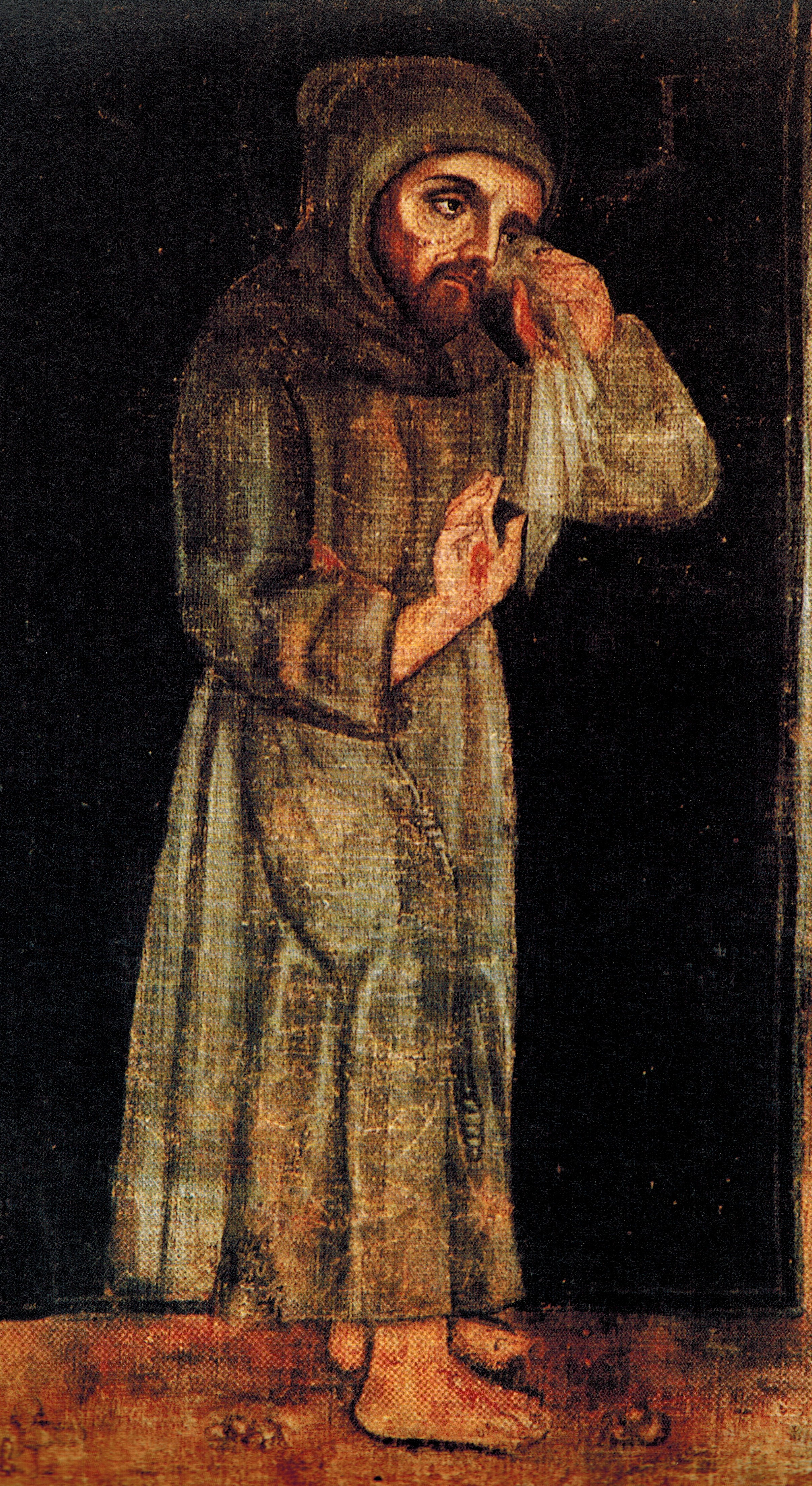 San Francisco llorando, del santuario de Greccio